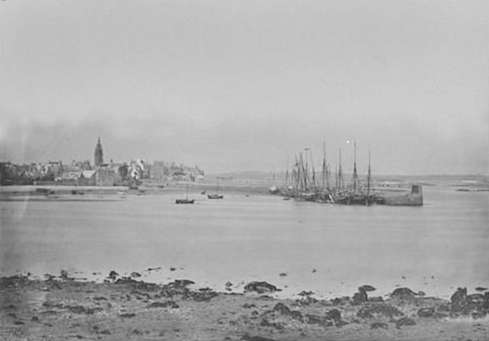 Roscoff : le port en 1873 (photo de J. Duclos